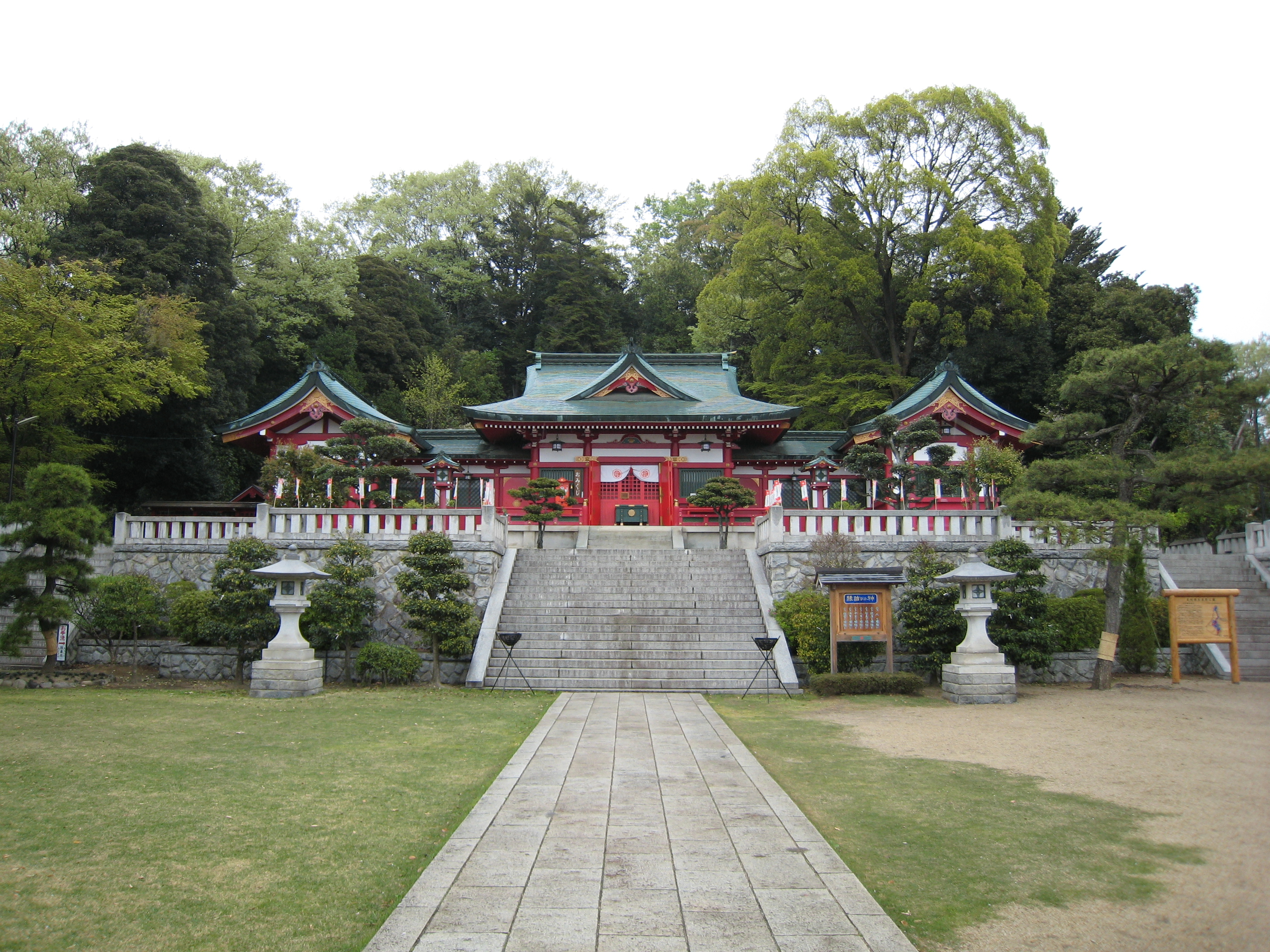 Orihime Jinja(shrine) ,Ashikaga city,Tochigi,Japan